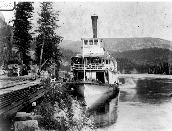 Lytton sternwheeler at Sproats Landing BC